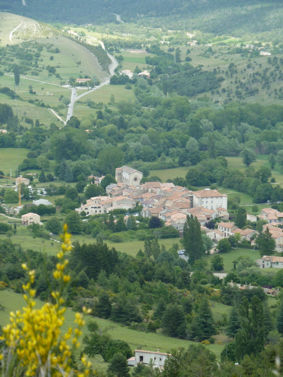 Vue du village de La Palud-sur-Verdon Var France